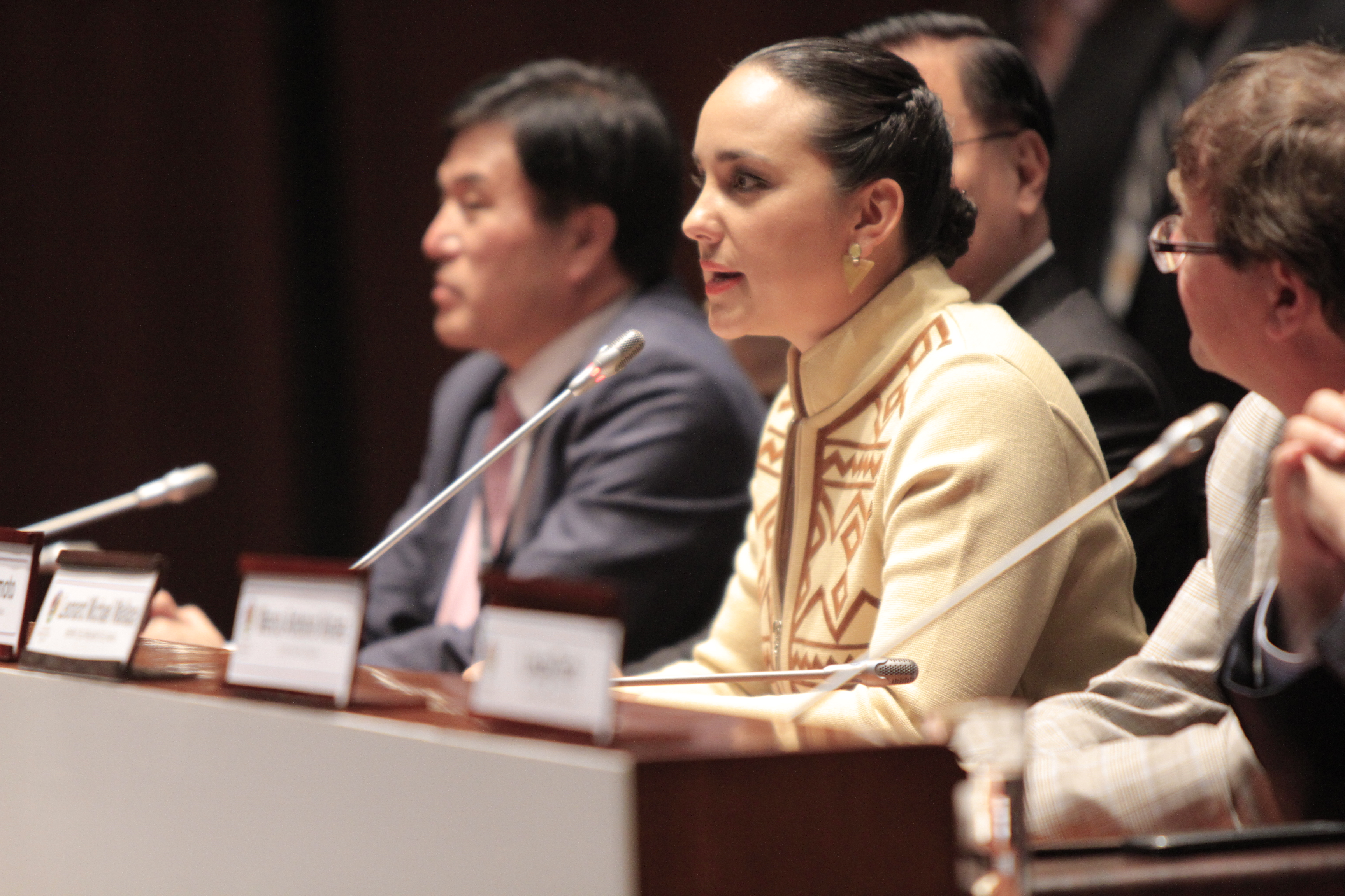 Quito, 12 enero de 2015.- Conferencia de Prensa de Gabriela Rivadeneira Presidenta del Foro Asia Pacífico y Presidenta de la Asamblea Nacional del Ecuador